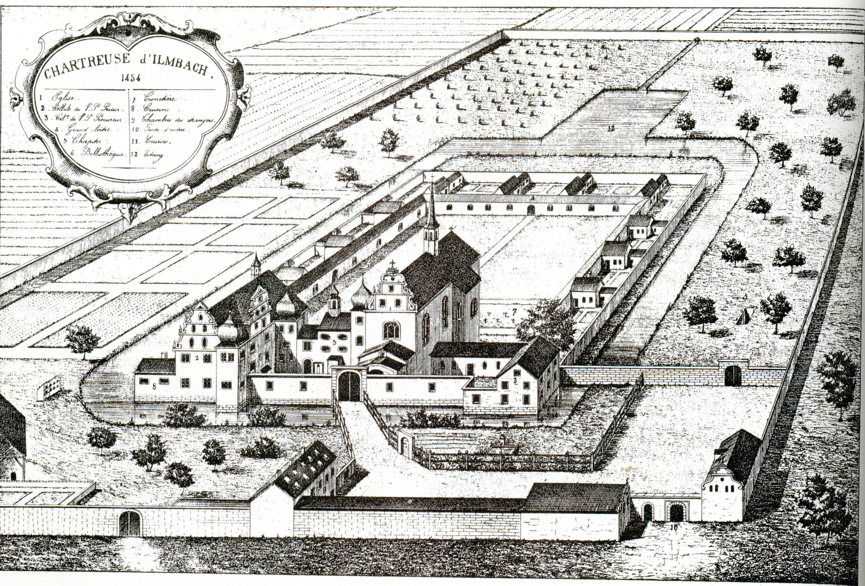 Kartause, Ilmbach, graphische Ansicht des Klosterareals mit dem Bestand vor 1634.